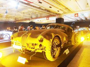 エジプトの王様が所有していた「タルボ・ラーゴ/Talbot Lago T26 Grand Sport SWB par Saoutchik – 1949」もかなりの高値がつき、フランスで行われたクラシックカーイベント「サロンレトロモービル2015」で1,702,000€で落札されました。